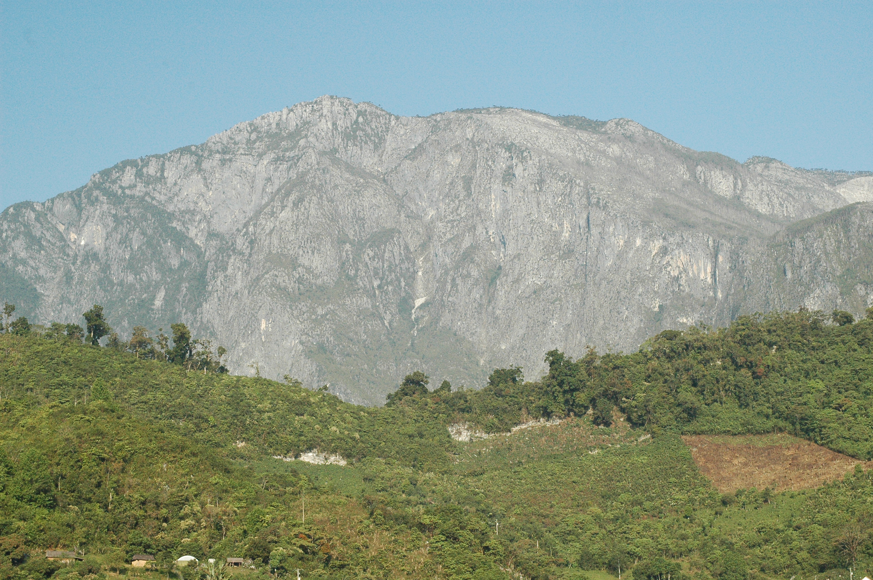 Face est du sommet du Zizintepetl prise a 4 km a une altitude de 2180 mètres lors de l'expédition spéléologique Mexpé 2011.